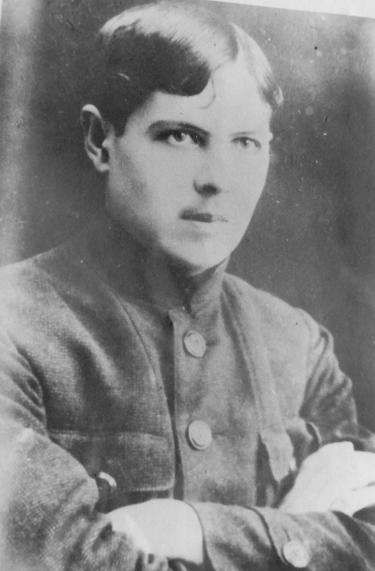 Ракович І.П.